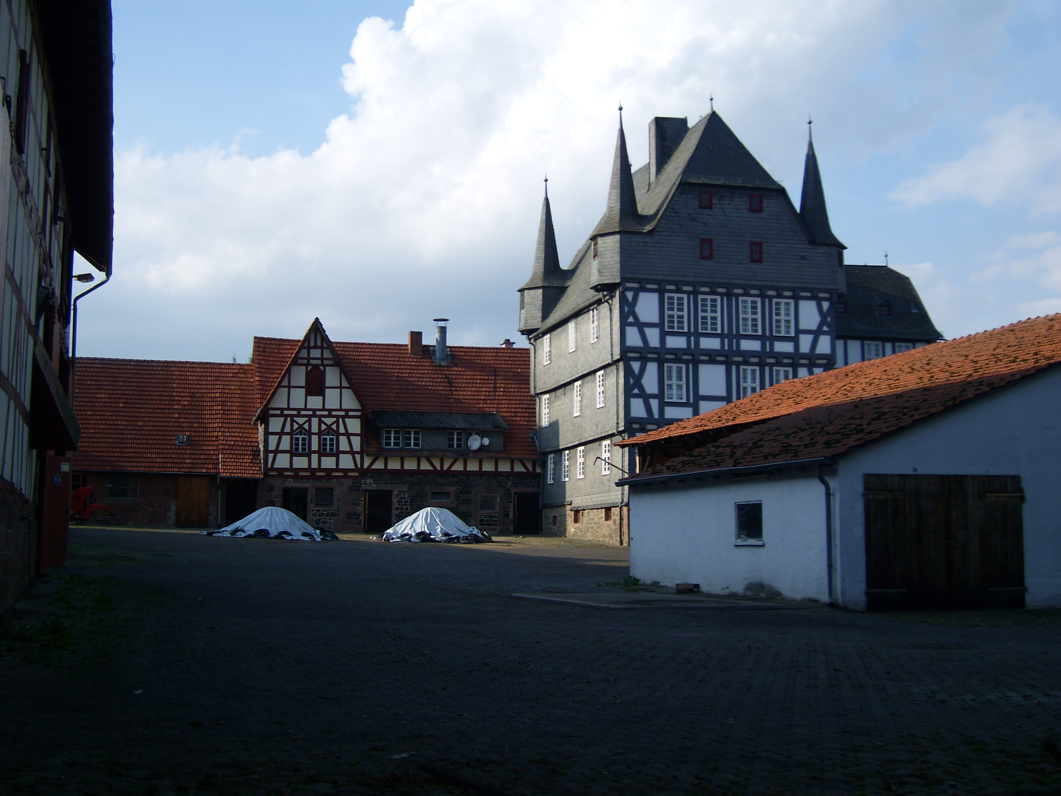 Rauischer Gutshof in Rauischholzhausen, frühgotisches Herrenhaus aus der 1. Hälfte des 16. Jahrhunderts. Südansicht.